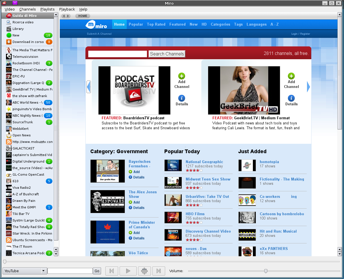 Miro 0.9.8.1 running on kubuntu